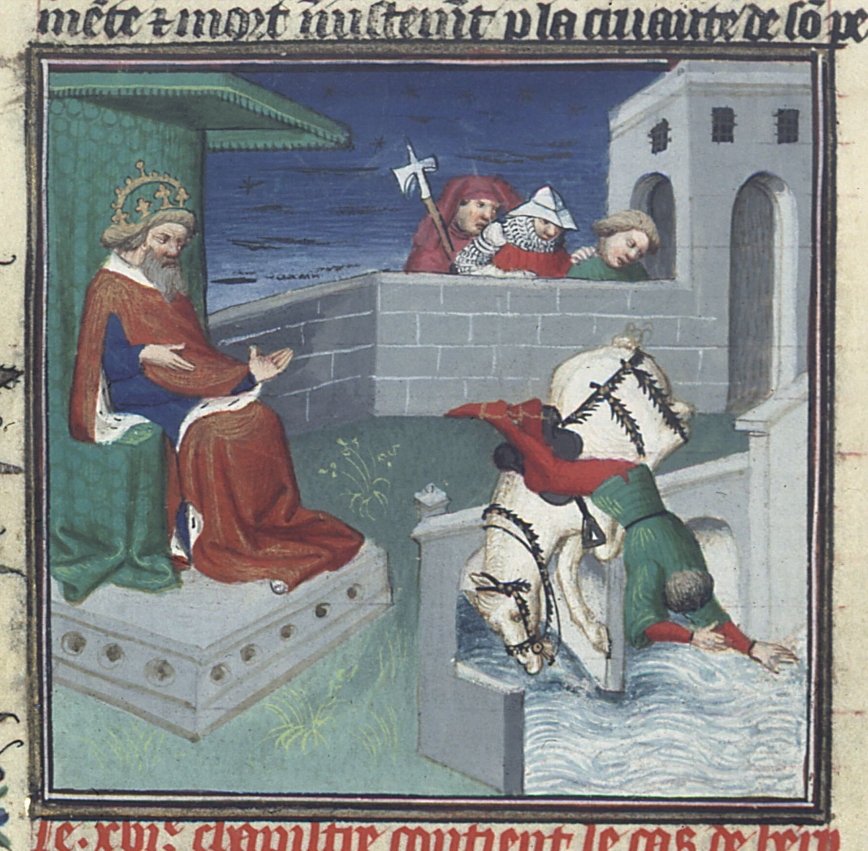 Mort de Henri roi des Romains